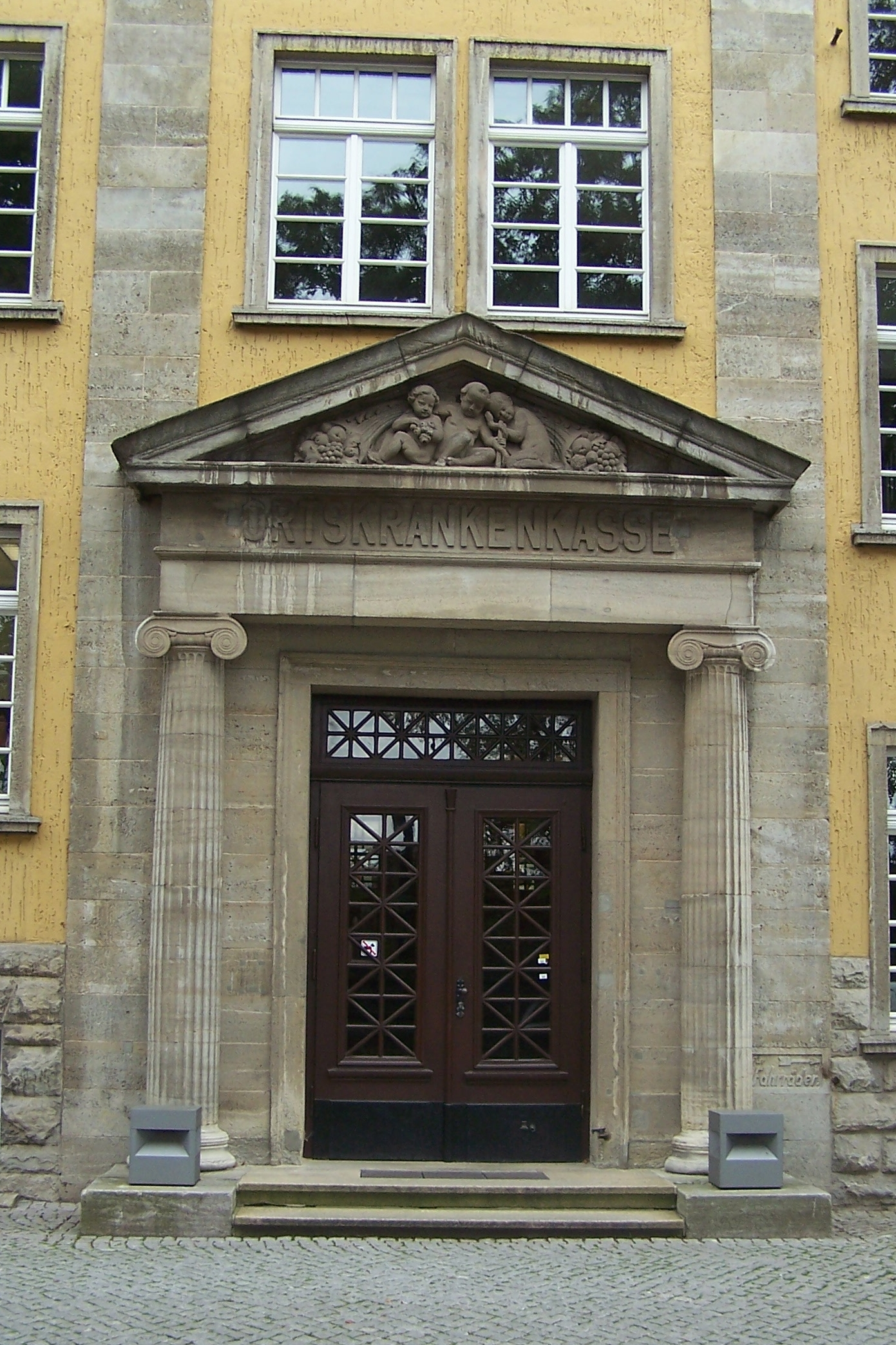 Das Gebäude wurde zuerst als Standort der Eisenacher Ortskrankenkasse errichtet. Das monumentale Portal wirkt mit den 3 Putten etwas weniger einschüchternd.